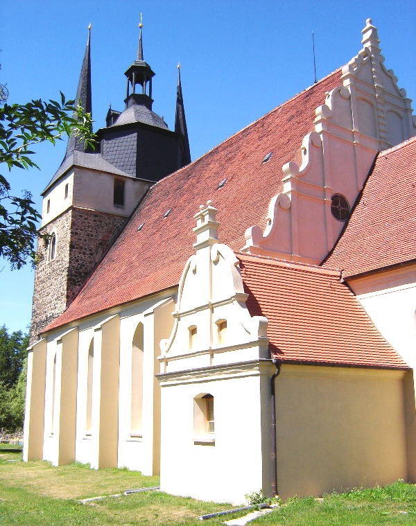 Laurentiuskirche Loburg (Sachsen-Anhalt)